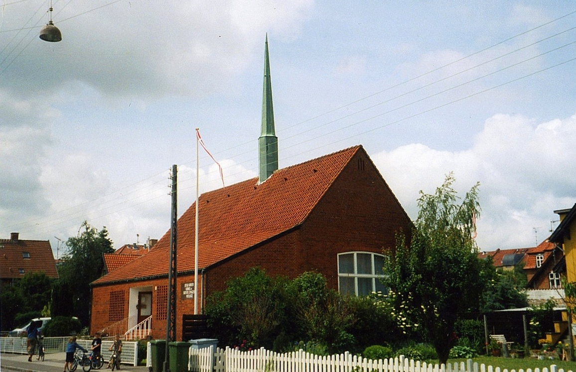 Jesu Kristi Kirke af Sidste Dages Hellige, Amager, Københavns Kommune